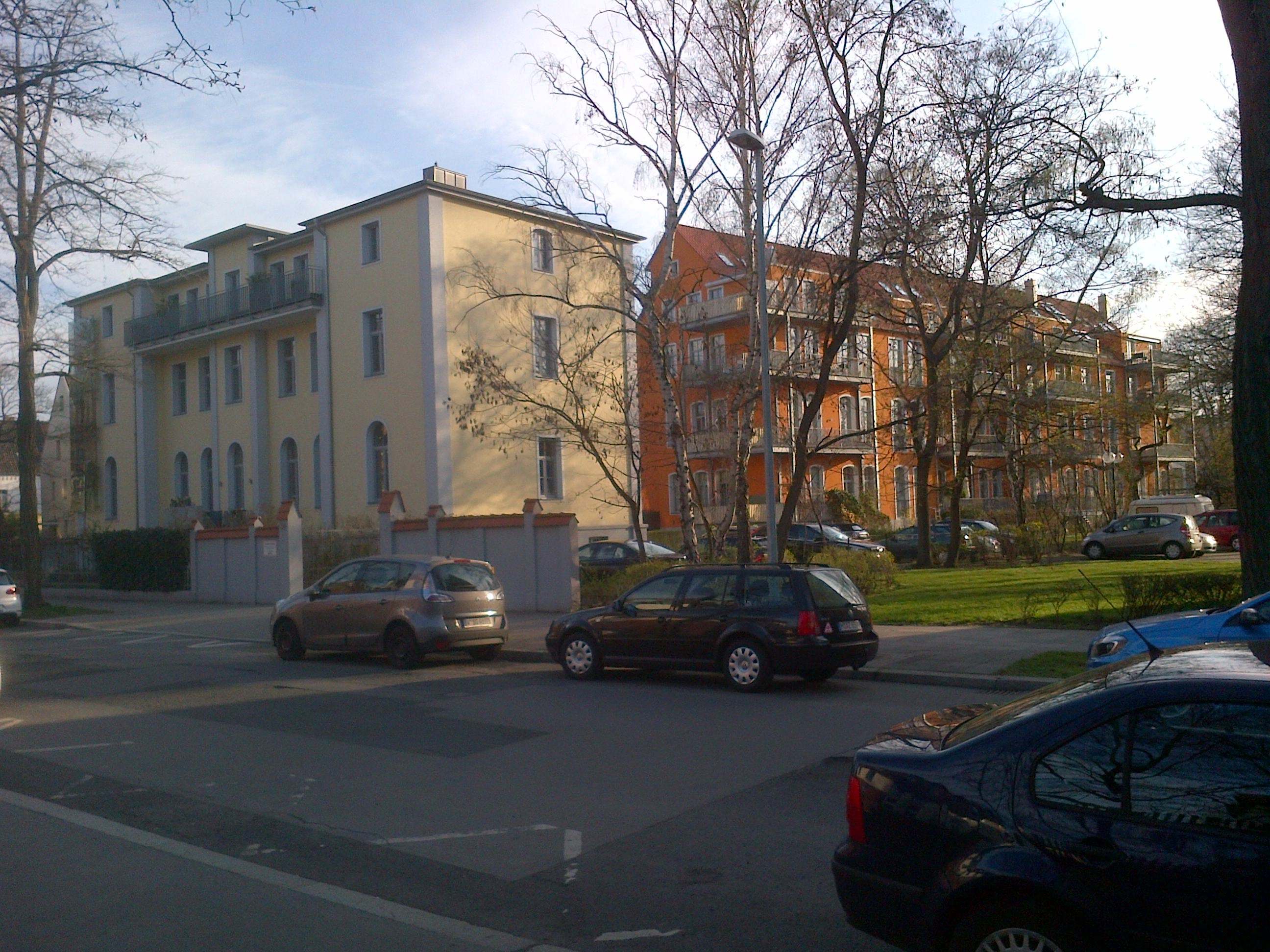 Ehemaliges jüdisches Krankenhaus Hannover - Gesamtansicht